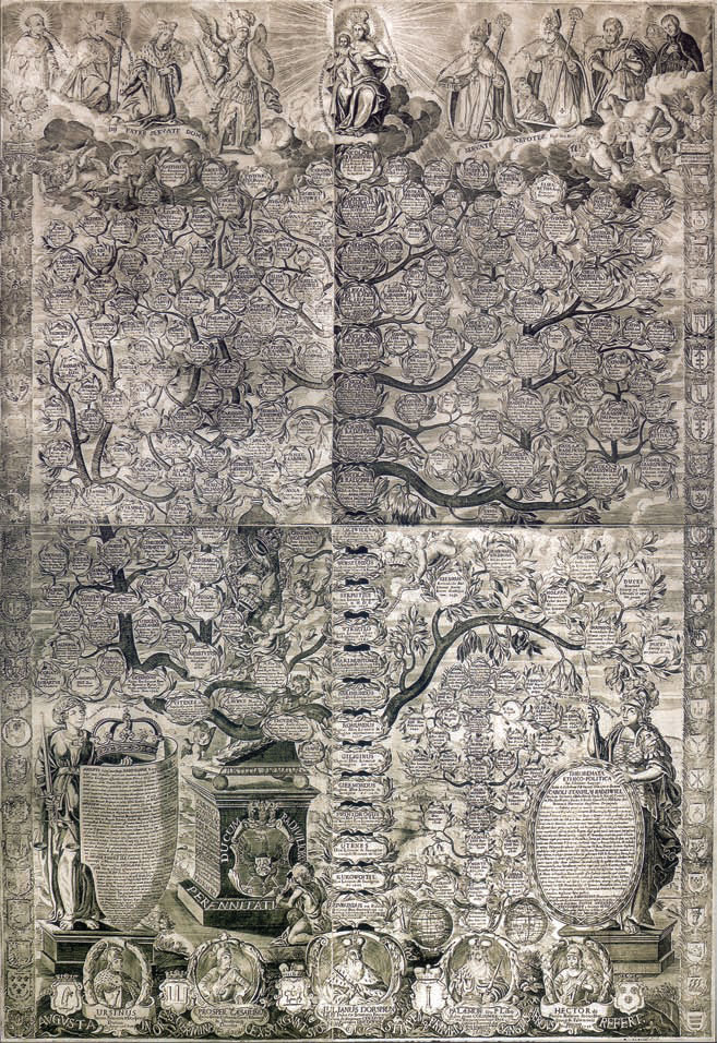 Беларуская (тарашкевіца): Радзівілы (Radziviły). Радавод